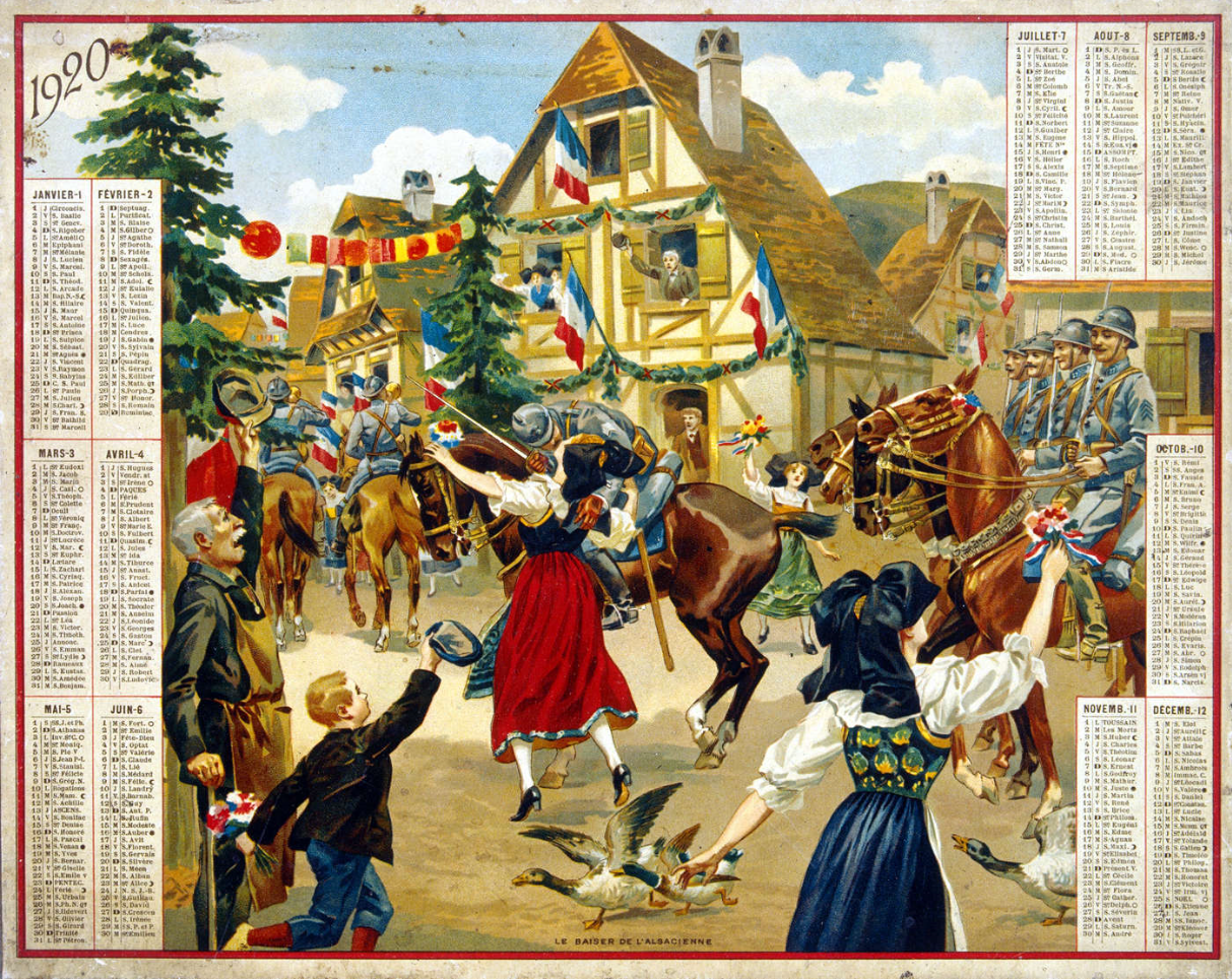 « Le baiser de l'Alsacienne », représentant l'entrée de la cavalerie française dans un village d'Alsace, pendant la seconde moitié de novembre 1918. Image du calendrier des Postes pour l'année 1920.